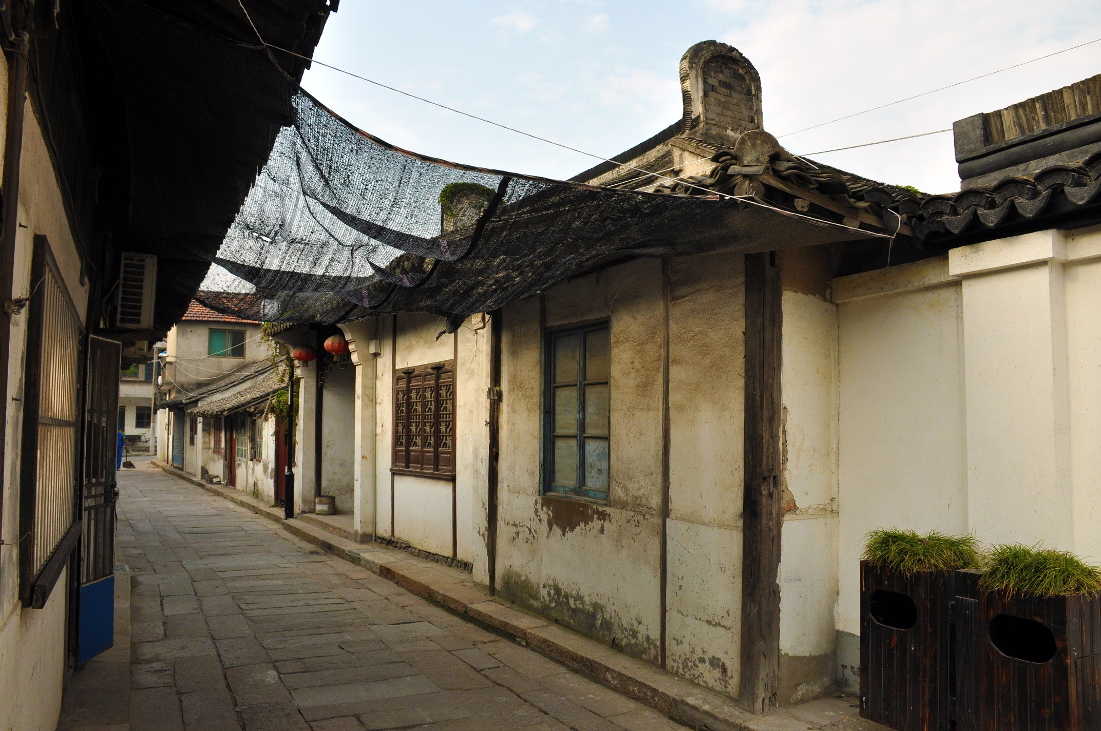 中文（中国大陆）: 方氏住宅 新场古镇新场大街114号南侧